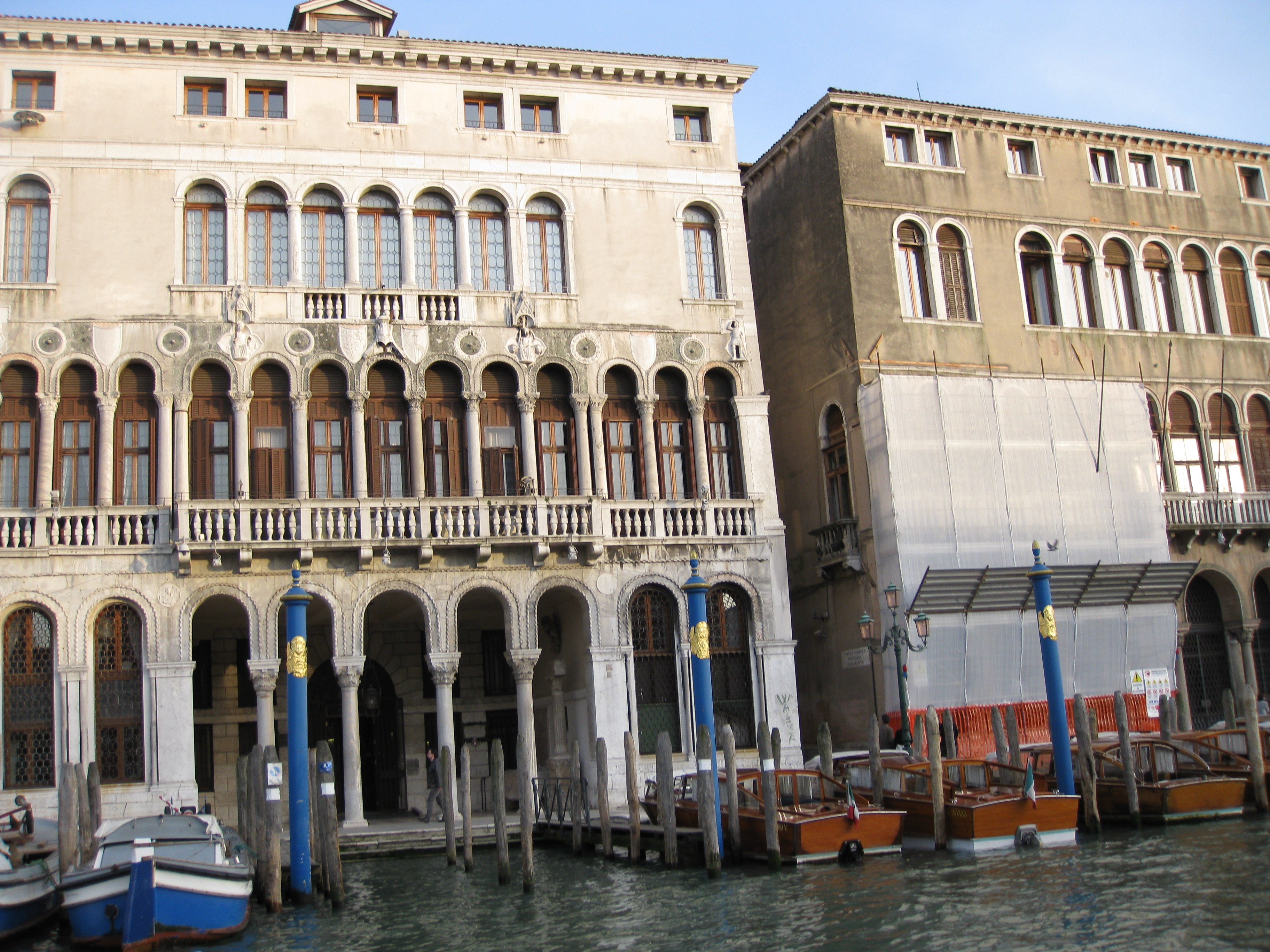 Palazzo Loredan, left, and Palazzo Farsetti, right